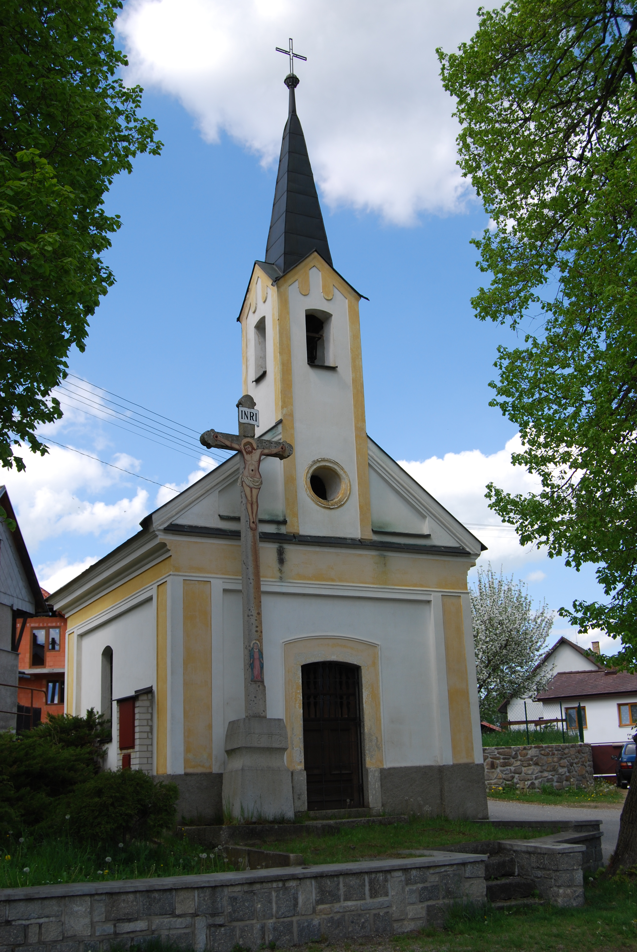 Návesní kaple a kříž v Bošicích. Obec Bošice se nachází v okrese Prachatice. Česká republika.